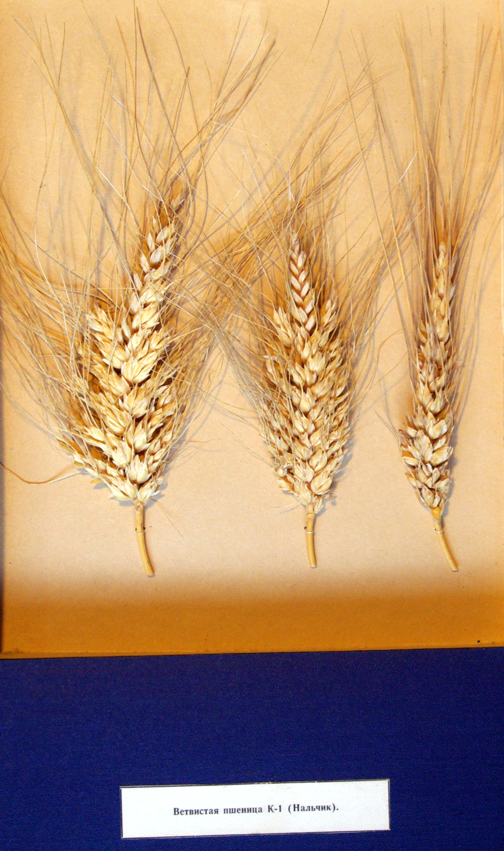 Фотография демонстрационного образца ветвистой пшеницы. На этикетке: "Ветвистая пшеница К-1, Нальчик".